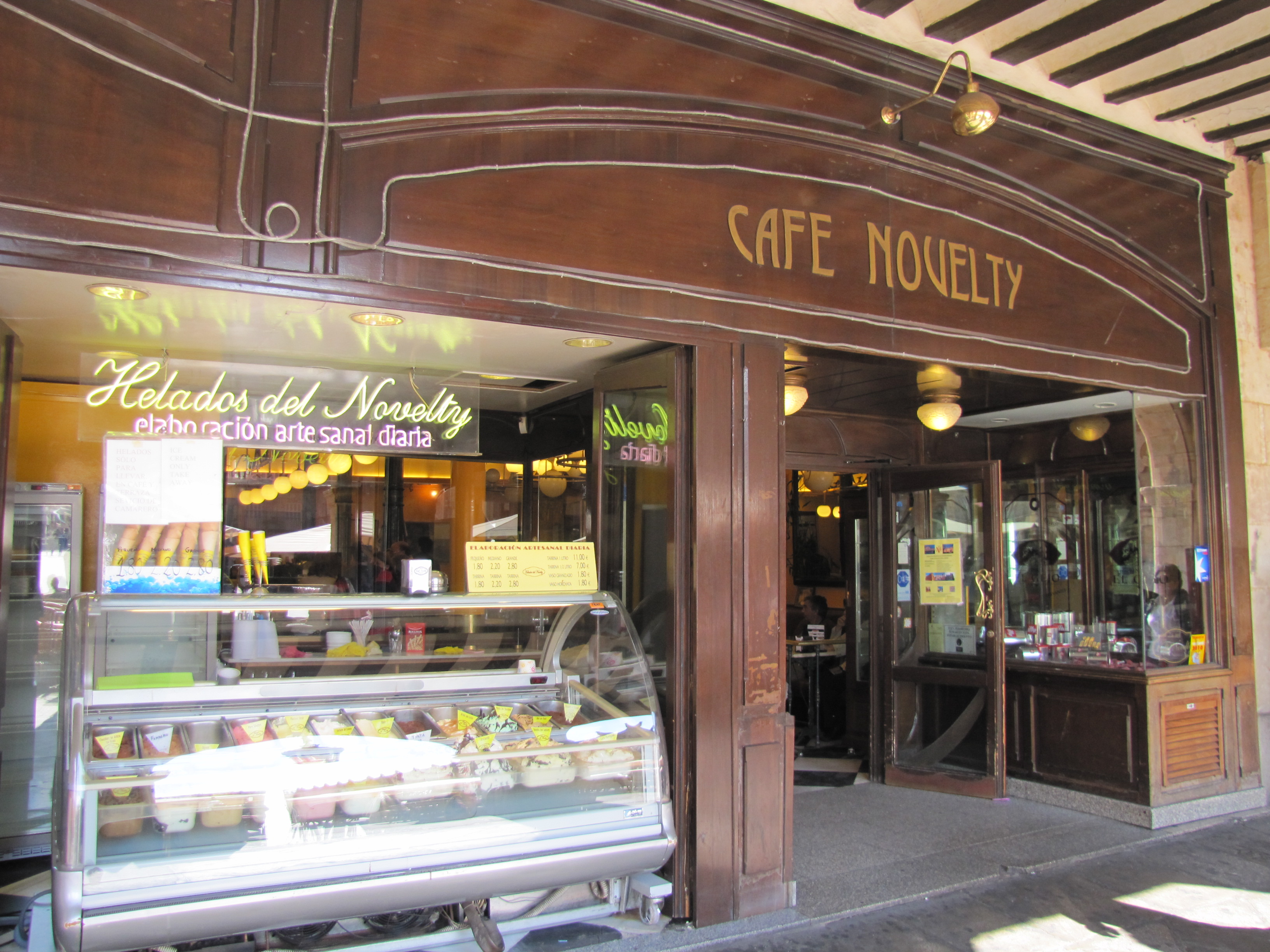 Fotografía del Café Literario Novelty, tomada desde la Plaza Mayor de Salamanca. El decano de los cafés de Salamanca, fundado en 1905. Y lugar habitual de reunión de literatos y artistas en la ciudad, como Torrente Ballester, el escultor Fernando Mayoral o el director de la RAE, Víctor García de la Concha entre otros.